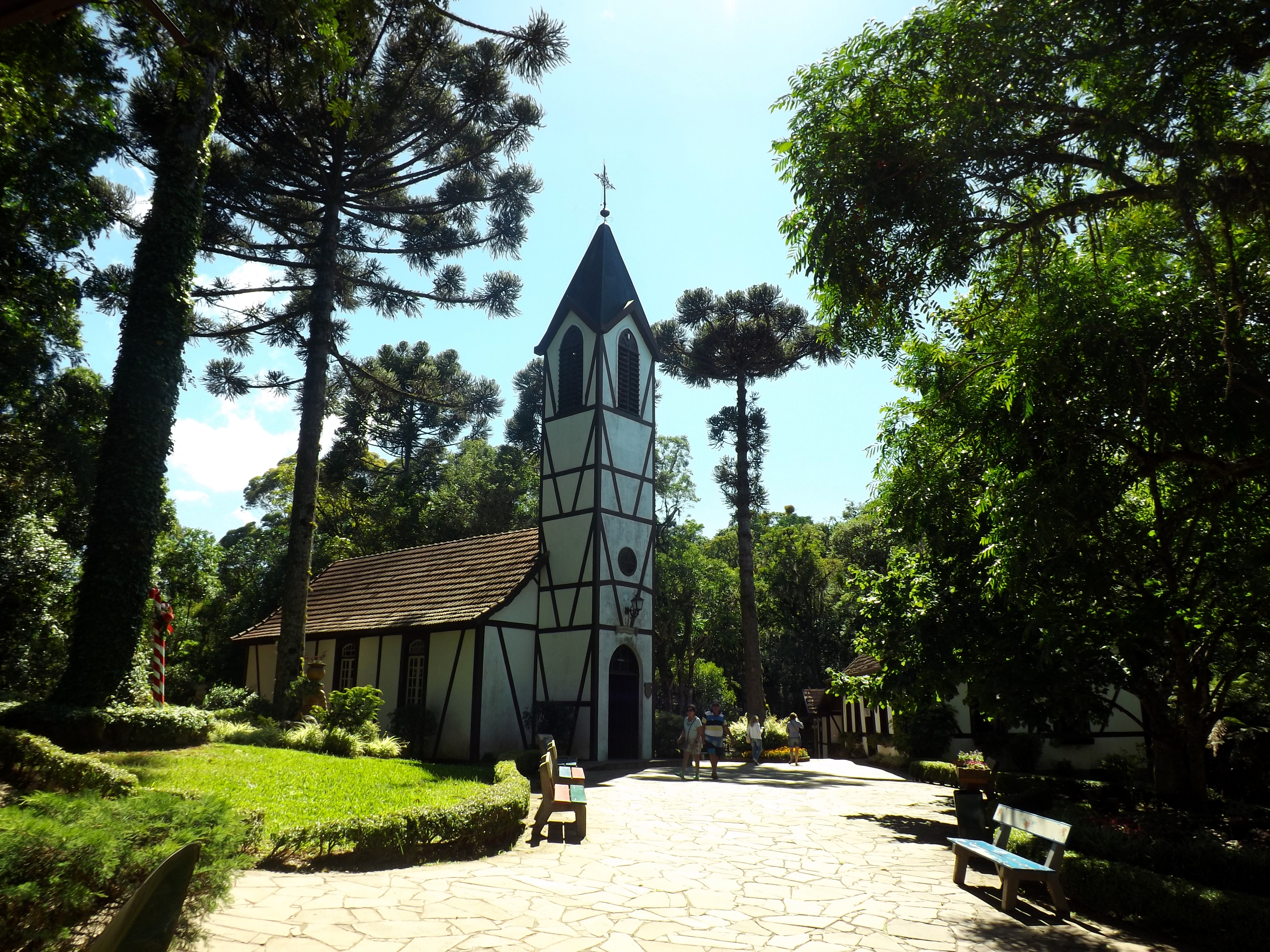 Nova Petrópolis - Parque Aldeia do Imigrante